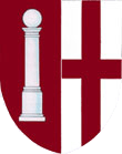 Wappen Koblenz-Bubenheim This file depicts the coat of arms of a German Körperschaft des öffentlichen Rechts (corporation governed by public law). According to § 5 Abs. 1 of the German Copyright law, official works like coats of arms are in the public domain. Note: The usage of coats of arms is governed by legal restrictions, independent of the copyright status of the depiction shown here.